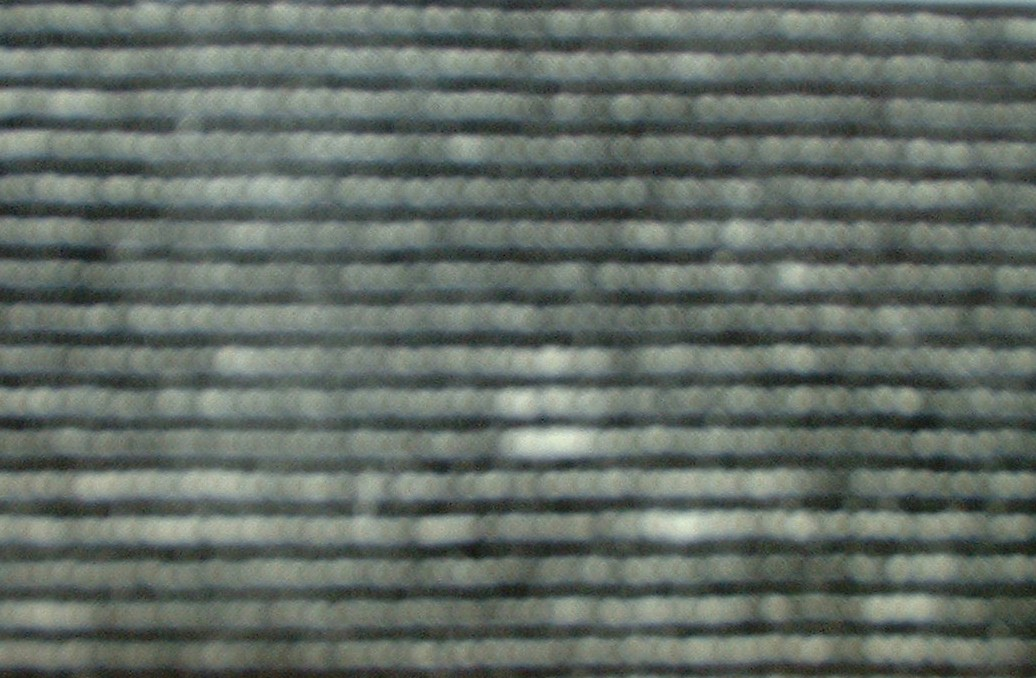 Querrips